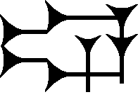 Cuneiform sign